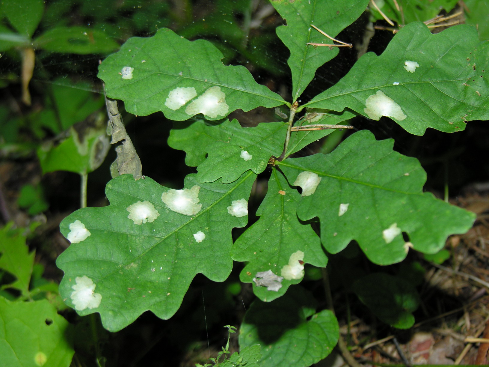 Lapo minos Foto: Algirdas, 2005 m. rugpjūčio 31 d.